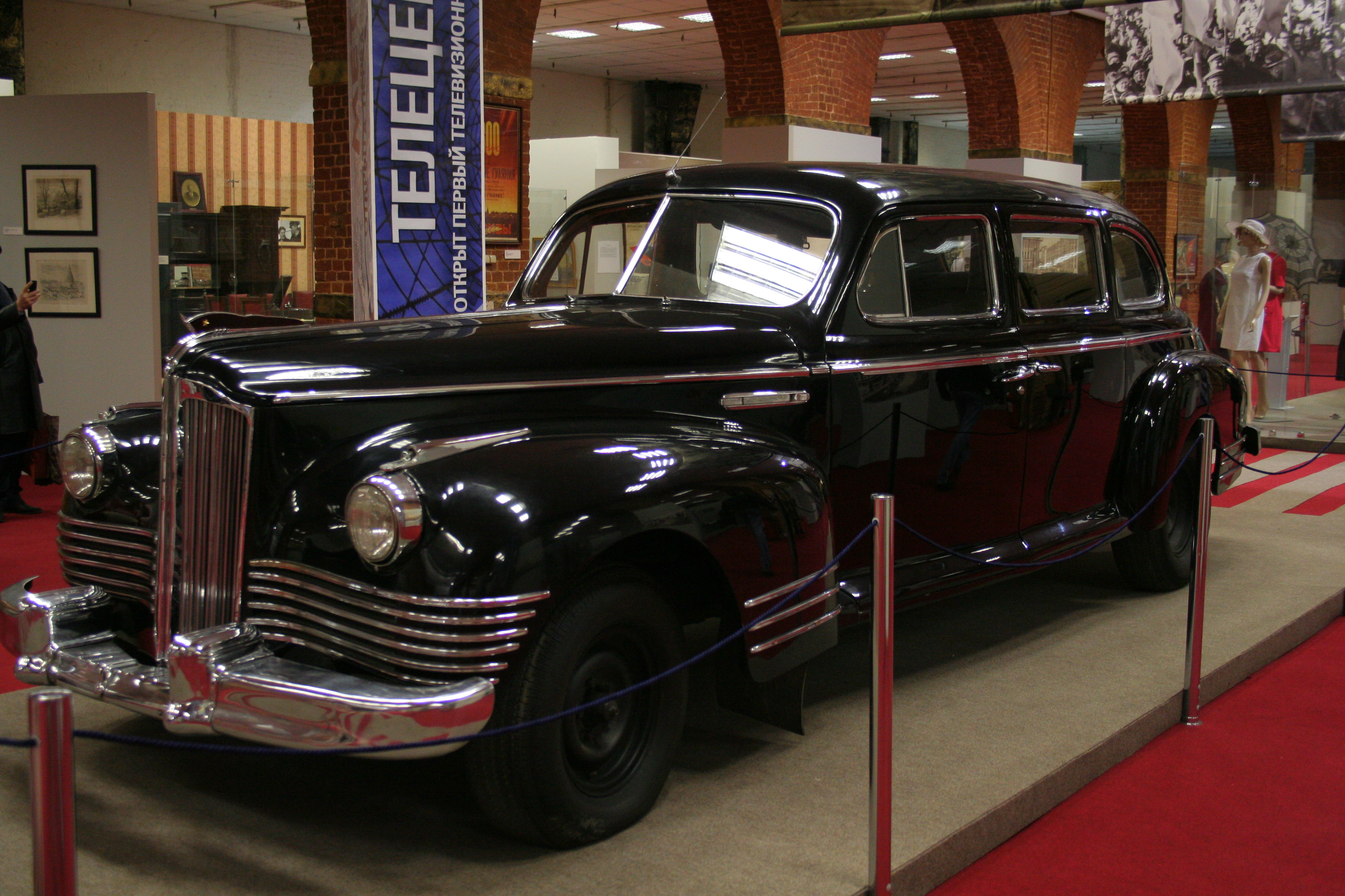 ЗиС-110 в Музее Москвы в бывших Провиантских складах.